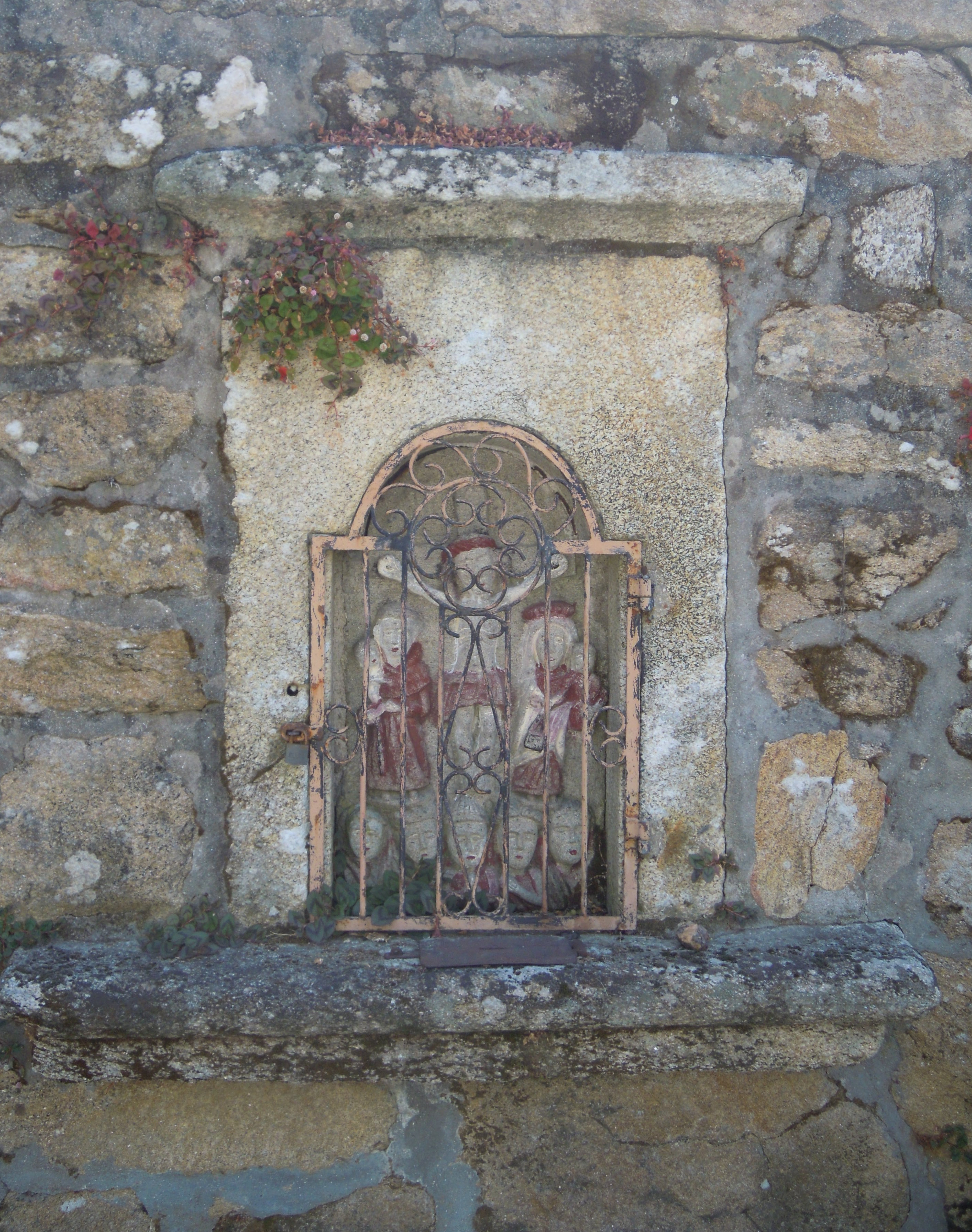 Peto de ánimas nos Eidos de Arriba (Sela, Arbo)